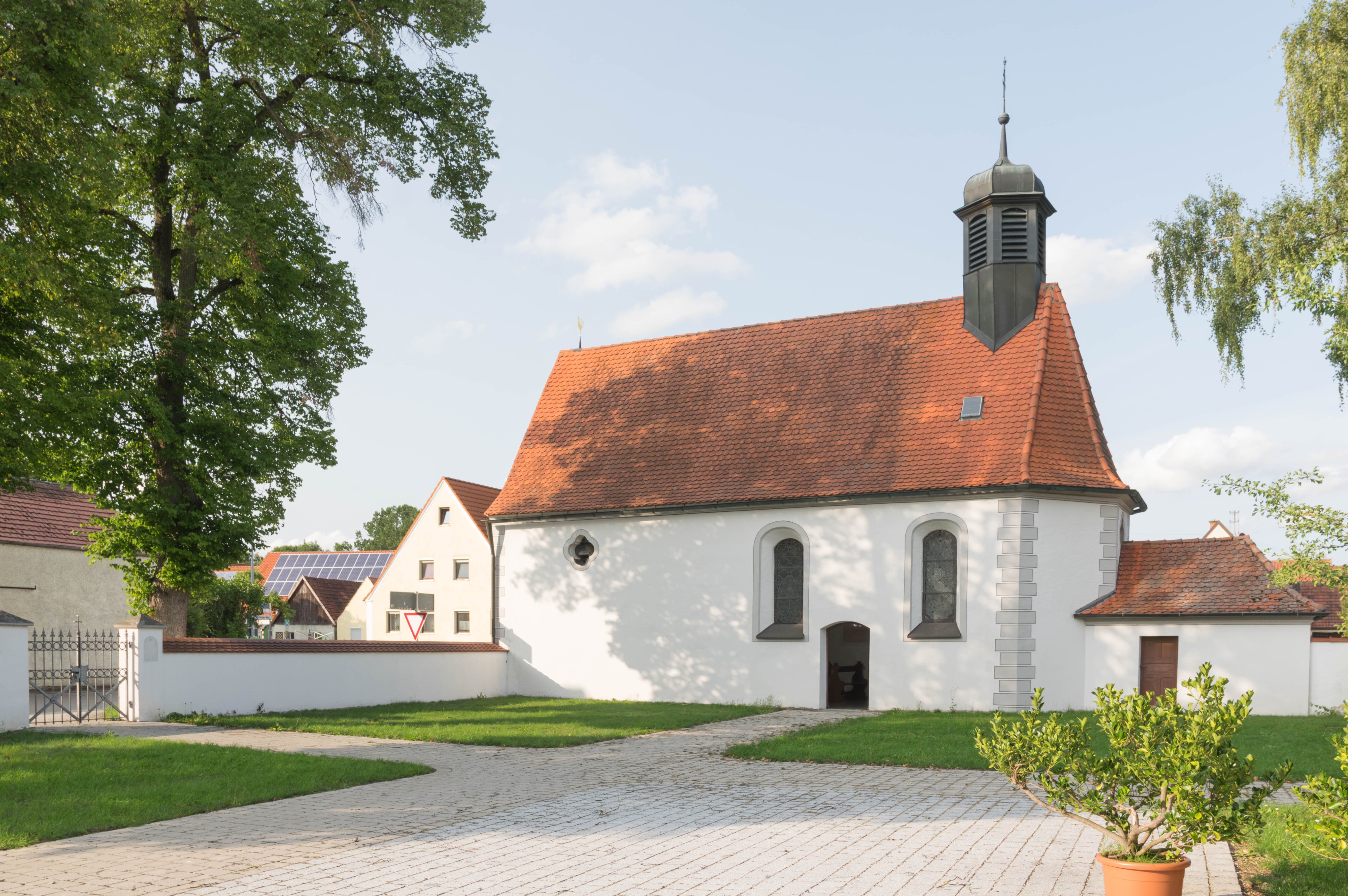 Kapelle St. Anna, Ansicht von Südwest; BaudenkmalThis is a photograph of an architectural monument.